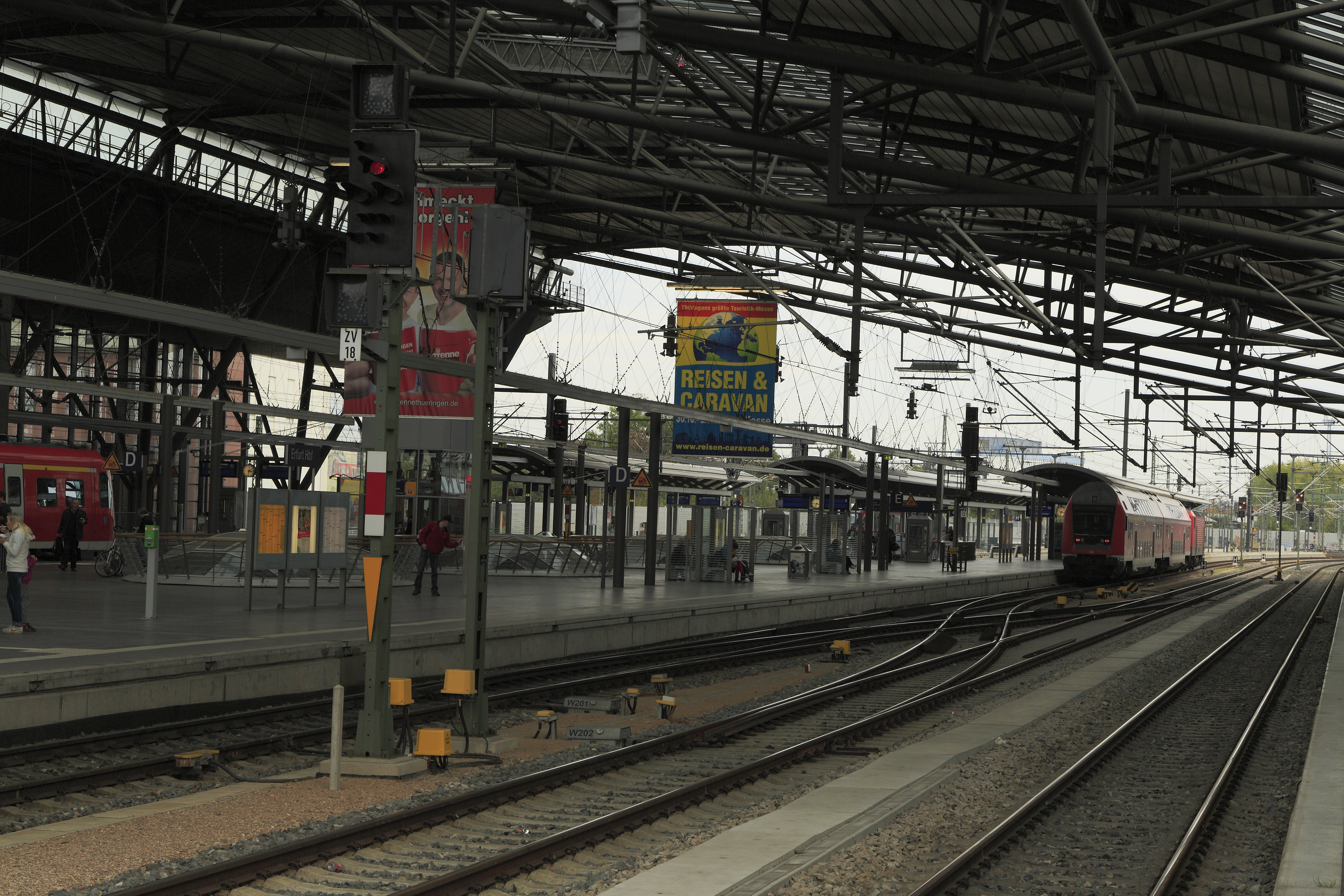 Gleis 8 bzw 18, das südliche der Durchgangsgleise am Regionalverkehrsbahnsteig. Das Gleis 12, das mit dem Gleis 8 über eine doppelte Weichenverbindung verbunden ist, dient dem Umfahren von Zügen auf der jeweils anderen Halteposition.